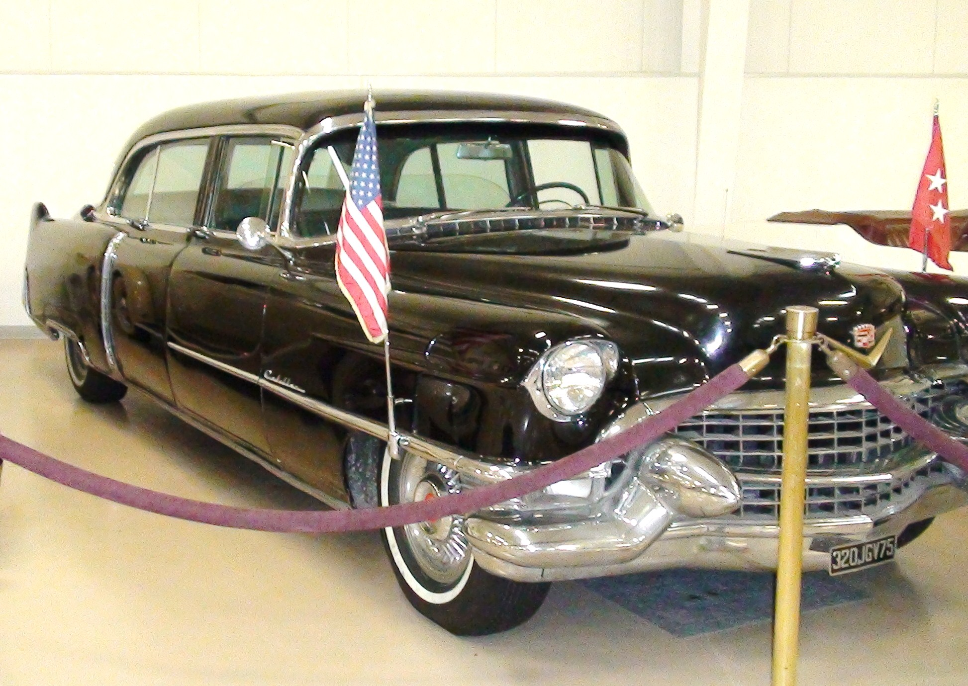 1955 Cadillac Series 75